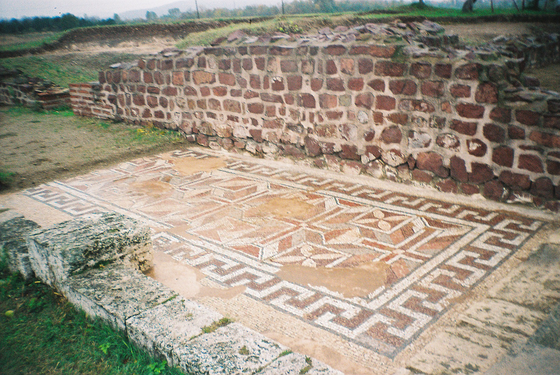 Medijana - podni mozaik